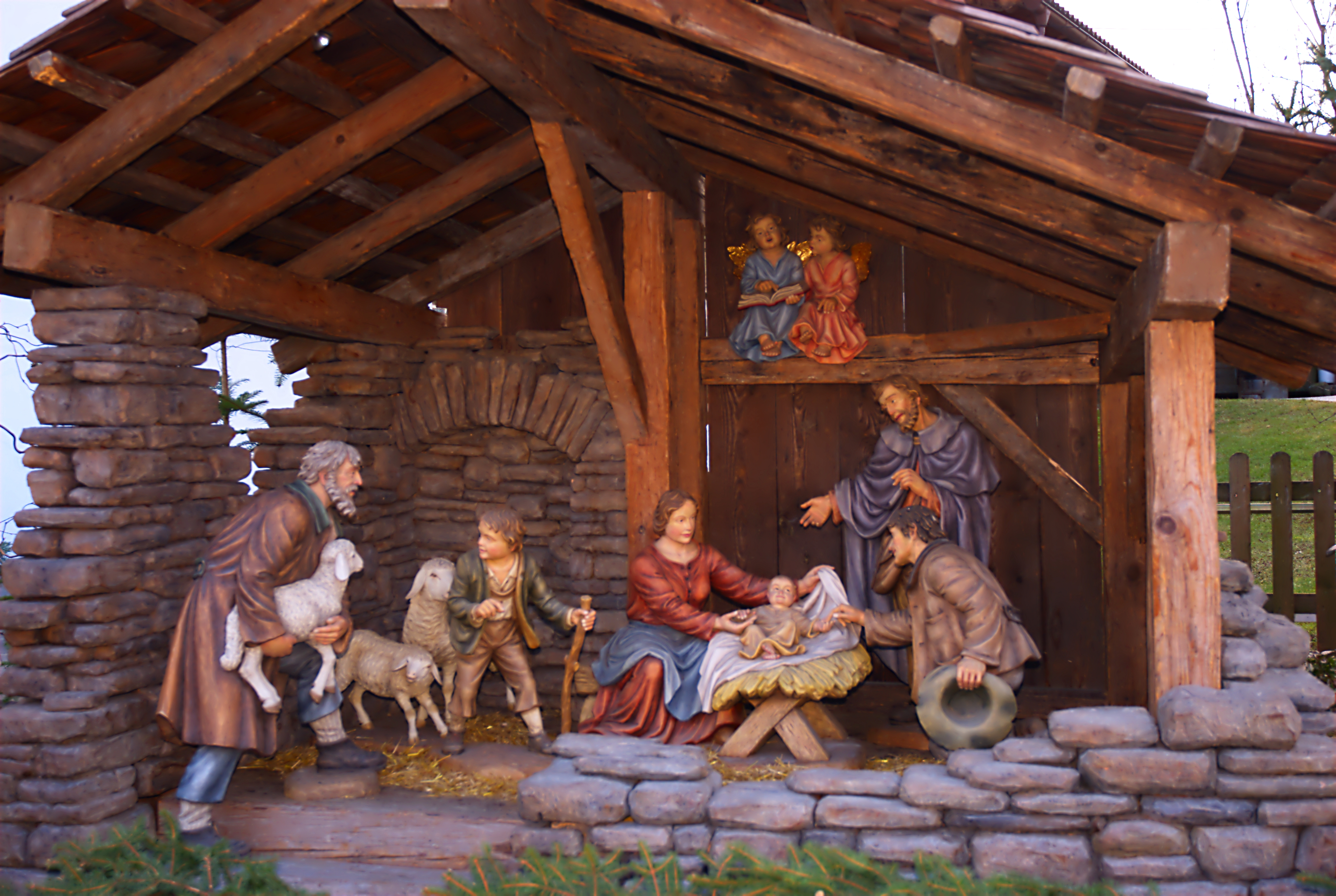 Dorfkrippe von Baumkirchen